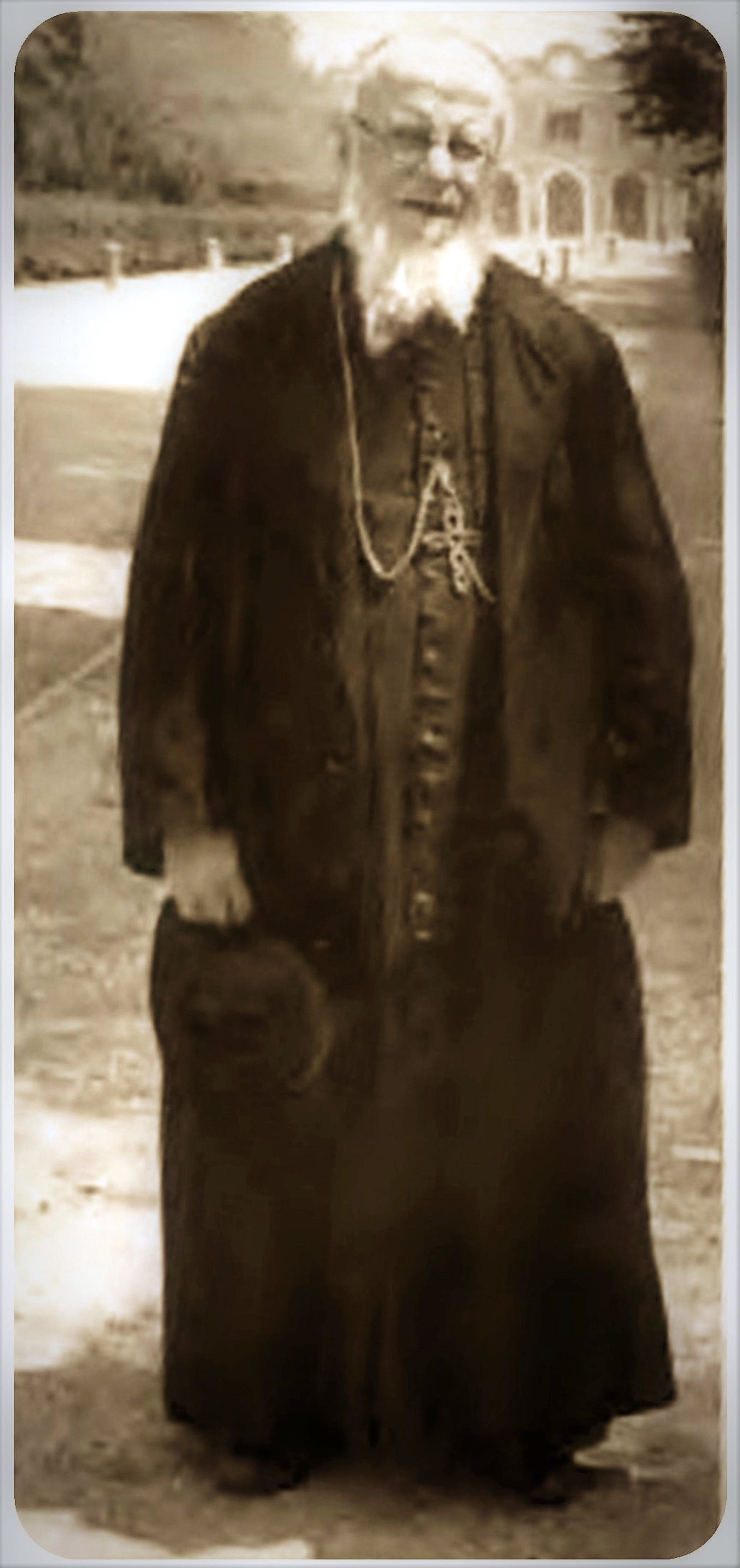 Monignor. Cornelio Sebastiano Cuccarollo